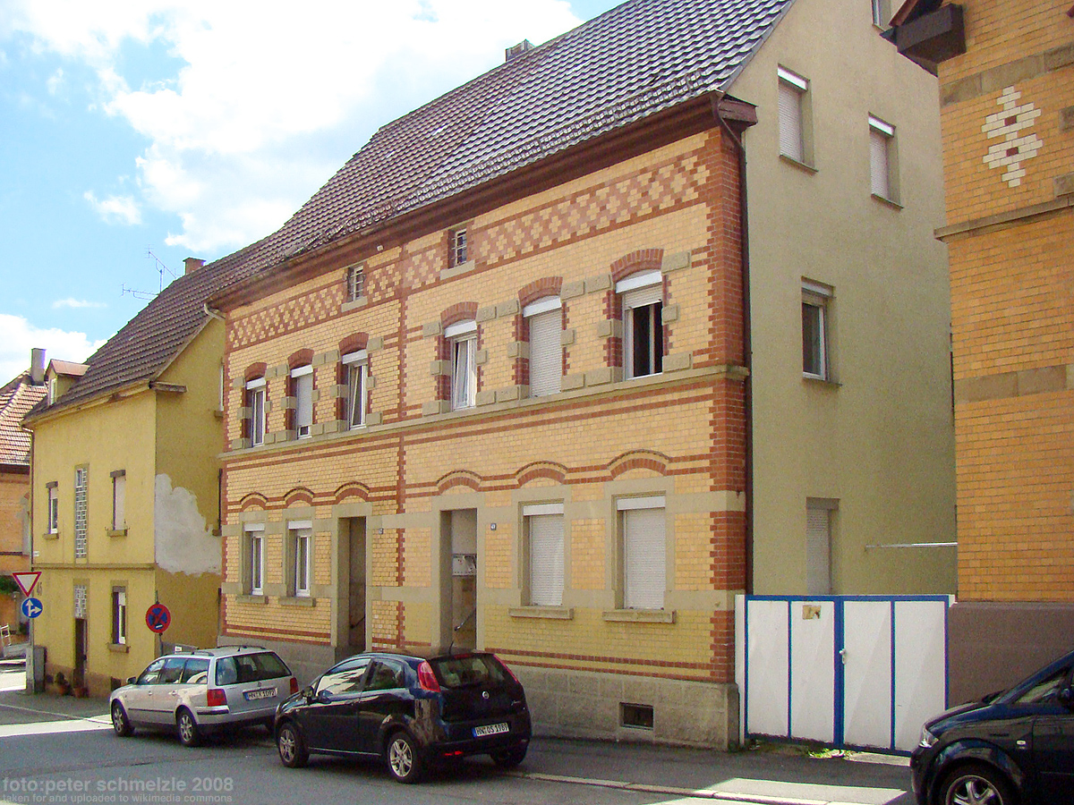 Denkmalgeschütztes Gebäude Eppinger Str. 47-49 in Heilbronn-Böckingen